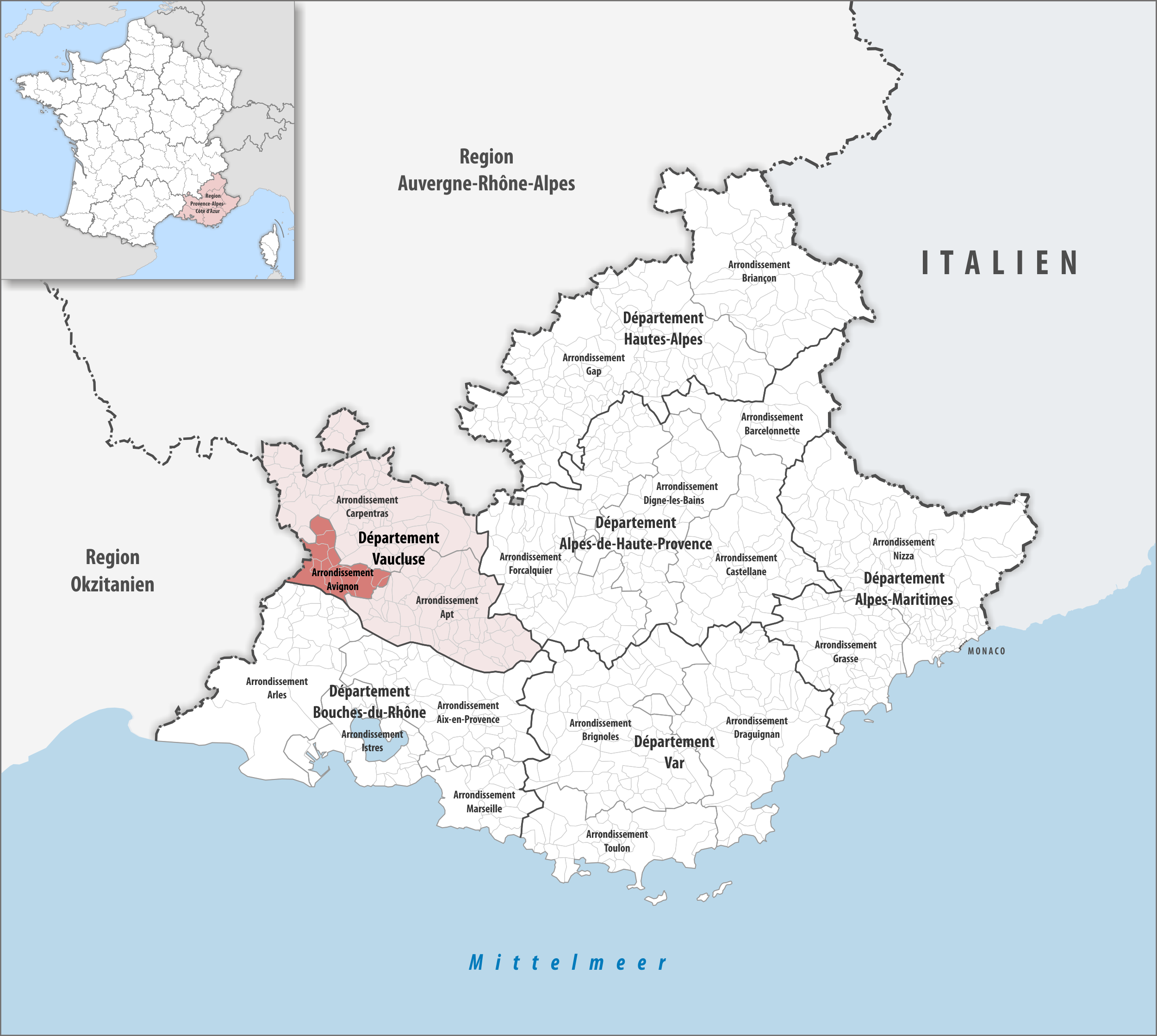 Lage des Arrondissements Avignon